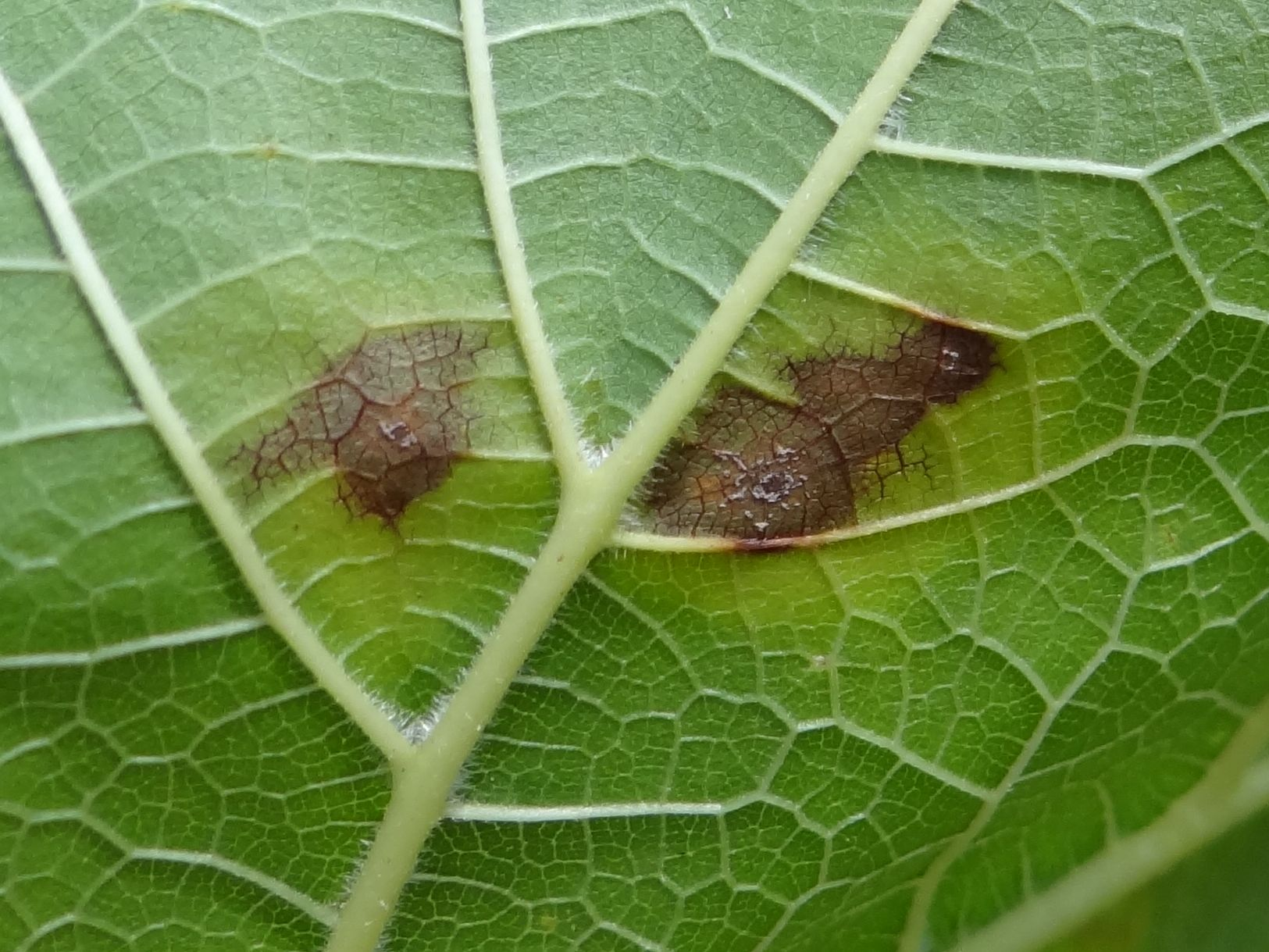 Mycosphaerella mori on leaf Morus alba. Location: Poland, Trzciana, województwo małopolskie